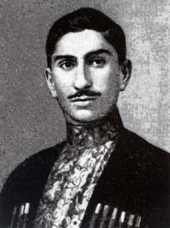 Seyid Shushinski (1889-1965)